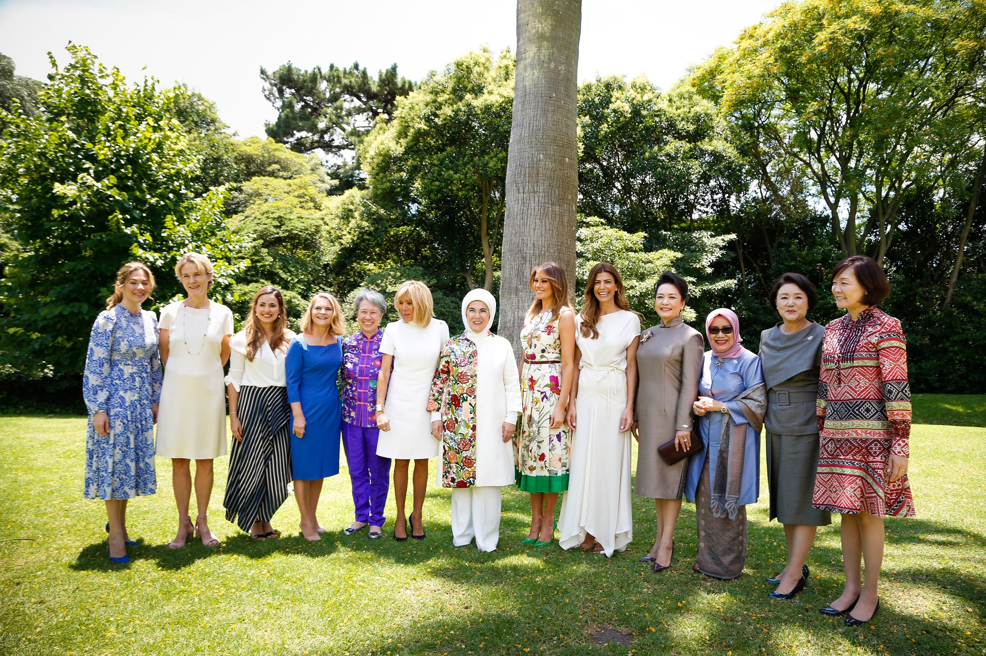 La primera dama de la Argentina, Juliana Awada, recibió en Villa Ocampo a las primeras damas y acompañantes de los jefes de Estado y Gobierno que asisten a la Cumbre de Líderes del G20. El encuentro, en el marco del Programa de Acompañantes, incluyó una recepción y un almuerzo en la residencia.